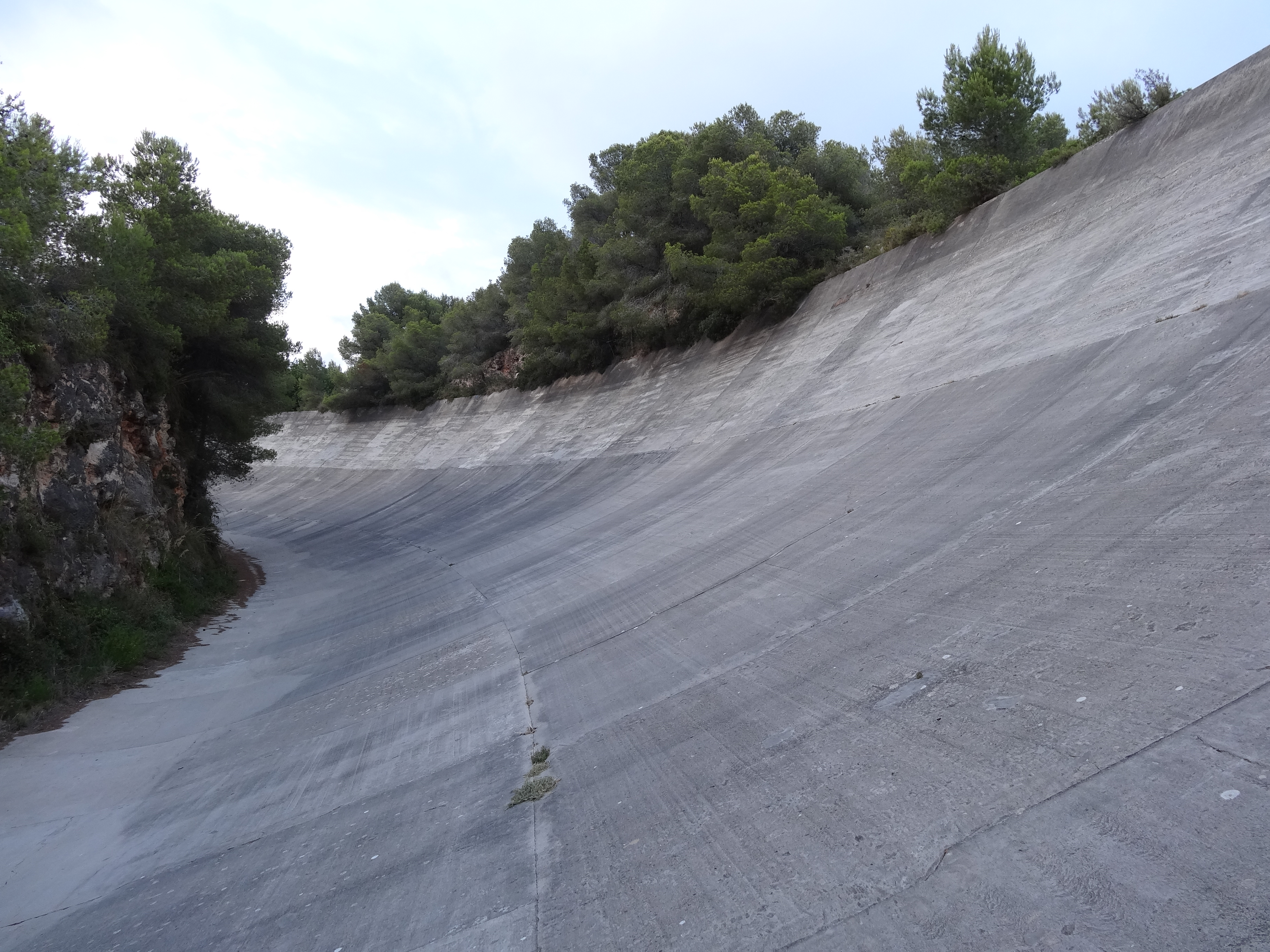 Autòdrom de Terramar, Sitges (juliol 2012)